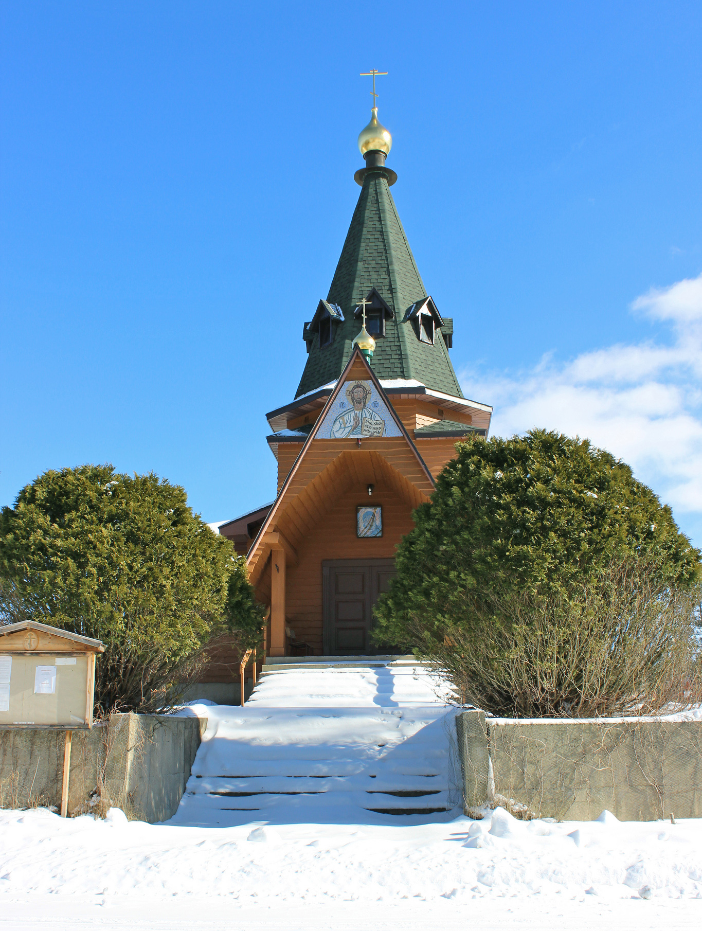 Holy Transfiguration skete in Mansonville. Winter